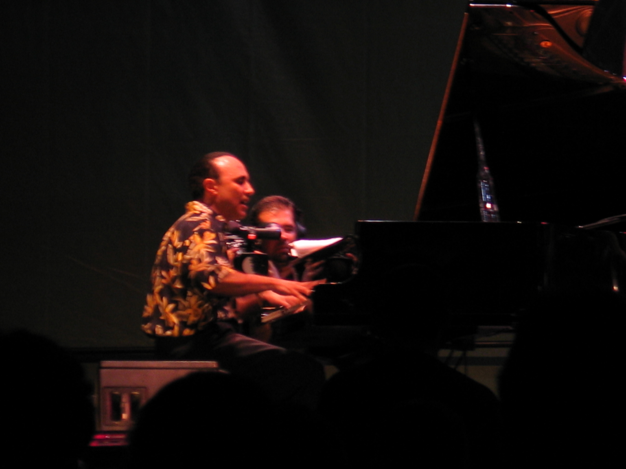 Dominican pianist Michel Camilo.